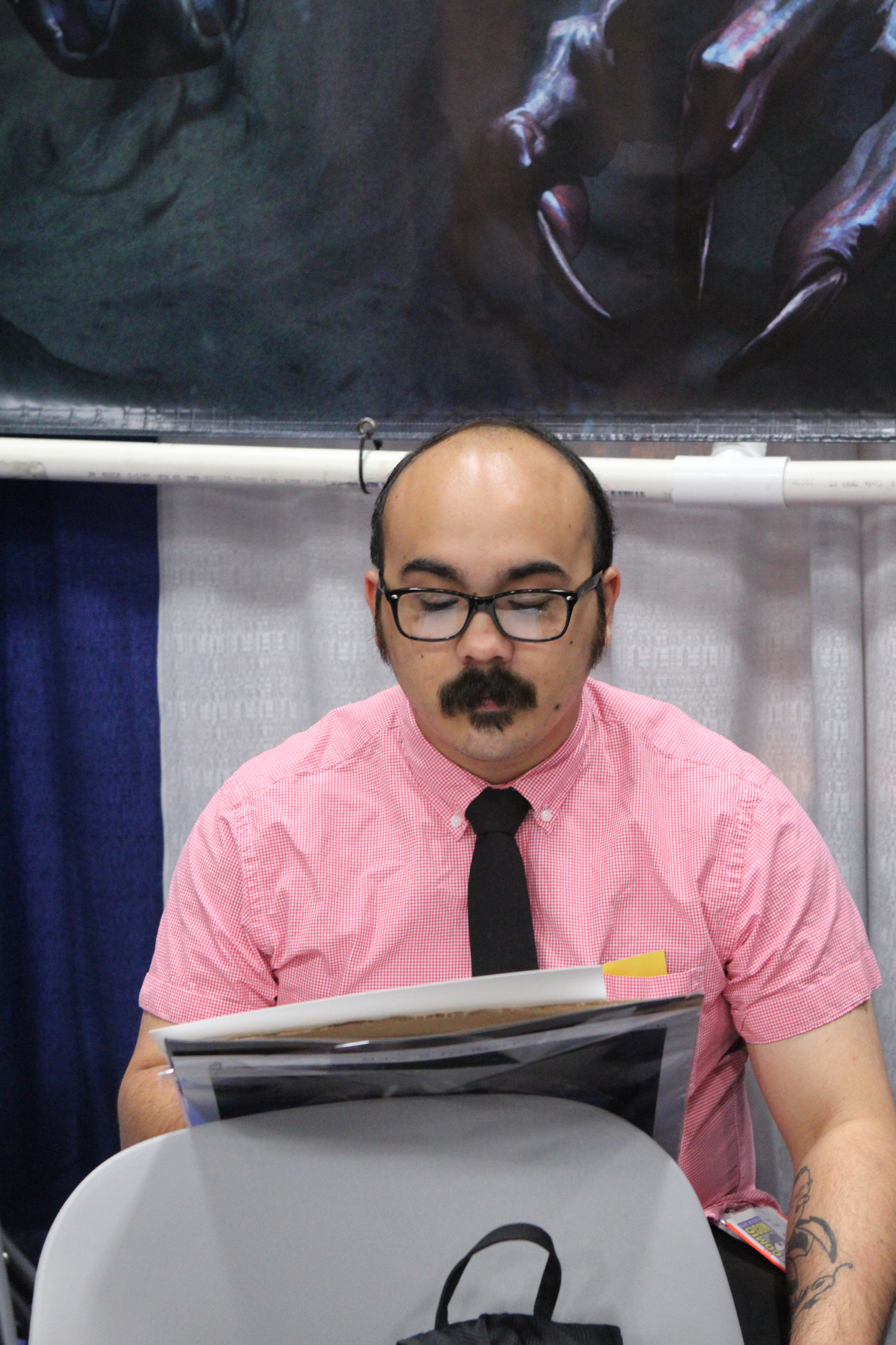 Kris Anka.